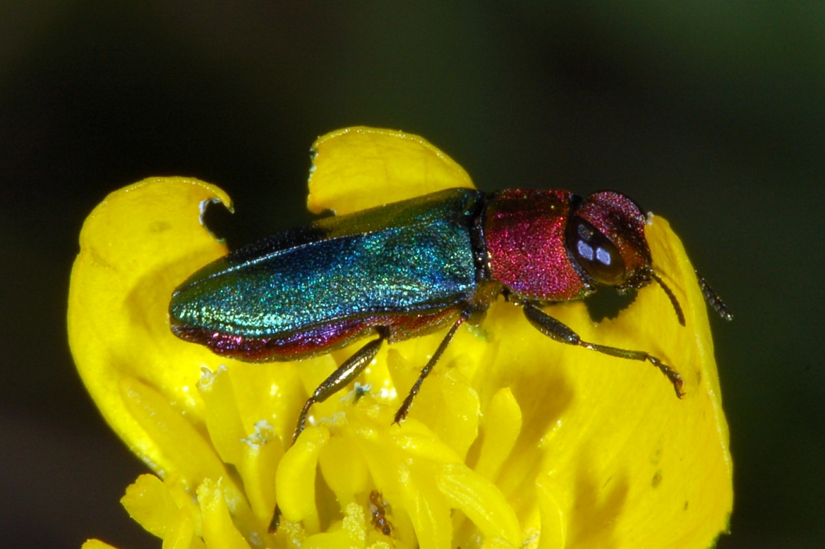 Glänzender Blütenprachtkäfer, Anthaxia nitidula, Knüllwald, Hessen, Deutschland